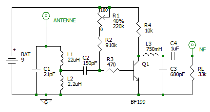 Audion mit Bipolartransistor